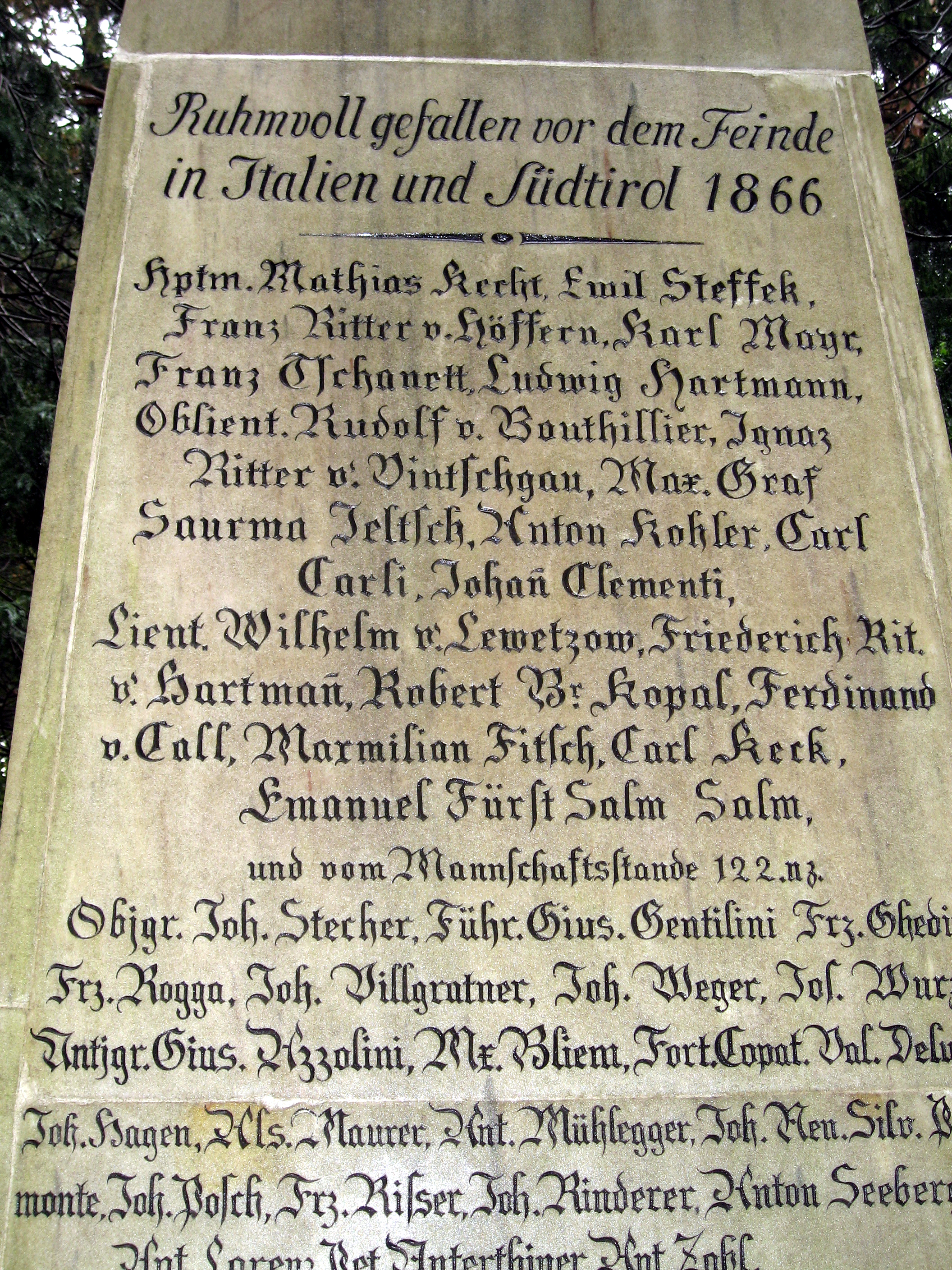 Österreich, Innsbruck, Bergisel, Denkmal für gefalllene Kaiserjäger, Detail